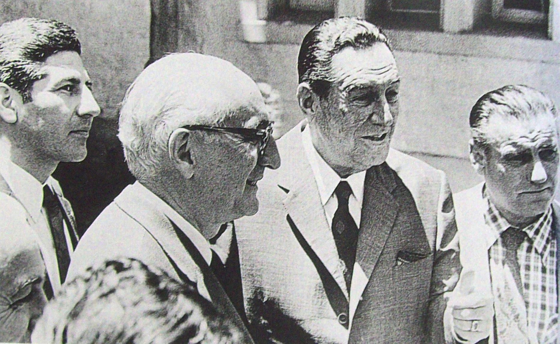 Es una foto de los dos ex presidentes argentinos Juan Perón y Arturo Frondizi.